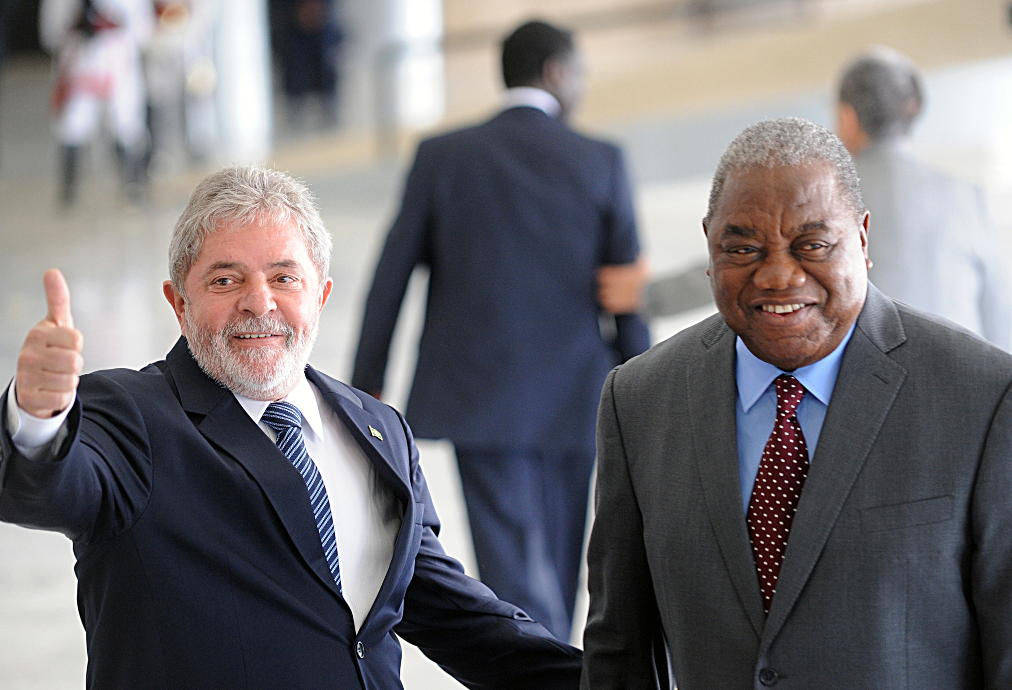 Brasília - O presidente Luiz Inácio Lula da Silva recebe o presidente da Zâmbia, Rupiah Bwezani Banda, no Palácio do Planalto. (Antonio Cruz/ABr)